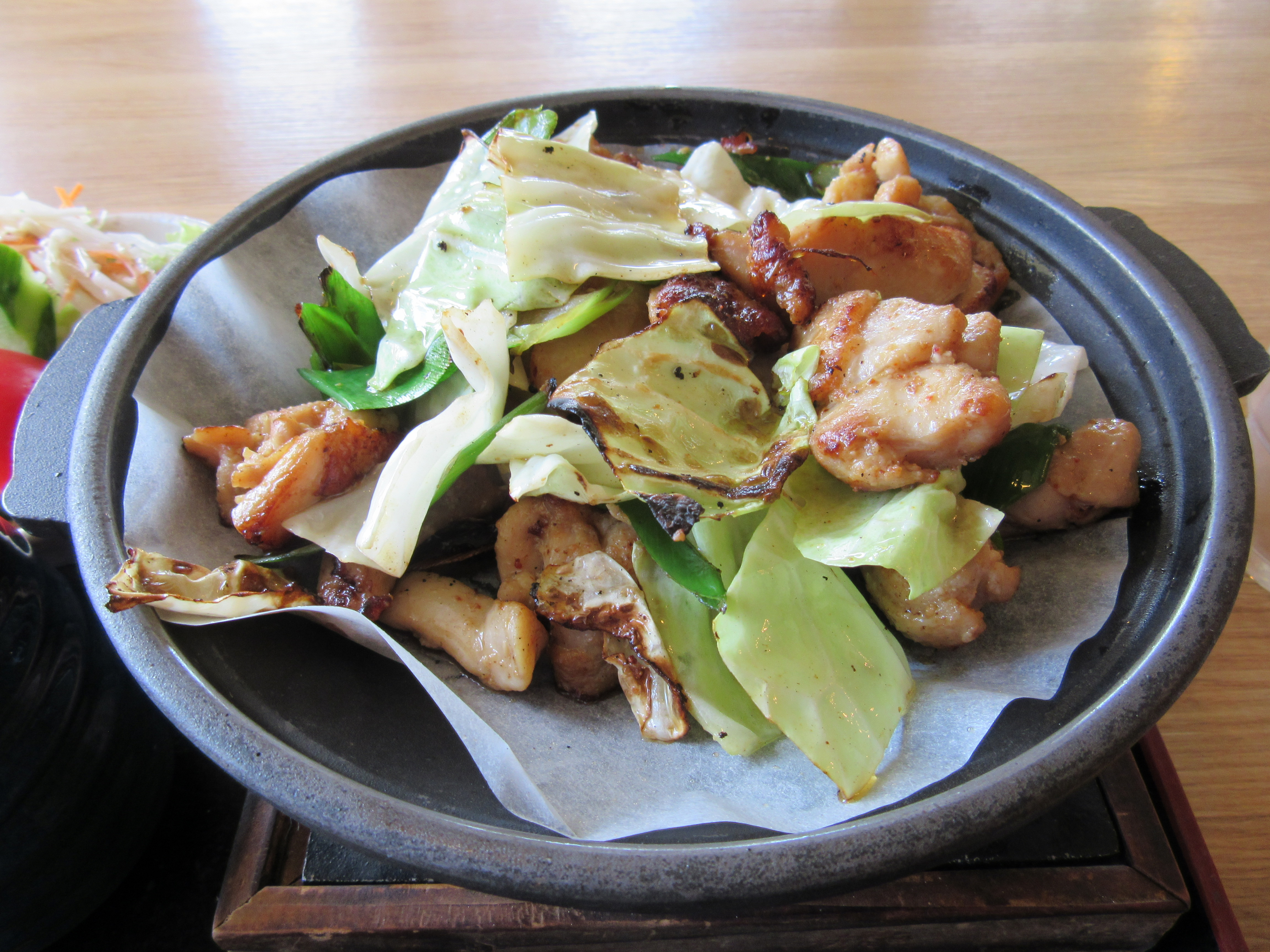 鶏ちゃん（けいちゃん）